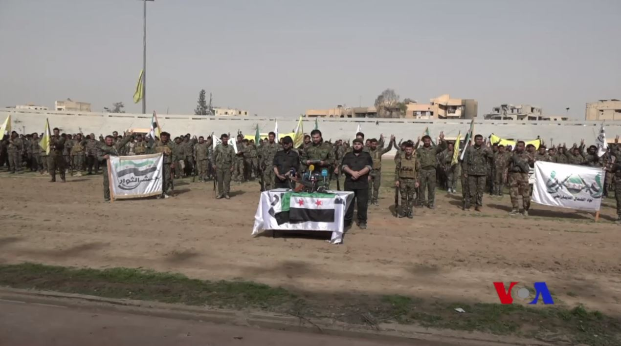 Combattants des groupes Jaych al-Thuwar et Liwa Chamal al-Democrati, affiliés aux Forces démocratiques syriennes (FDS), au stade de Raqqa, le 6 mars 2018. Abou Omar al-Idlebi, un commandant des FDS annonce alors le déploiement de 1700 combattants des FDS à Afrine contre la Turquie. 1 2 3